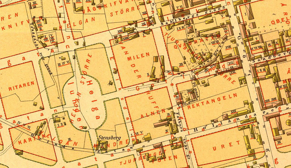 Del av karta över Stockholm visande Helgalunden på Södermalm med omgivning